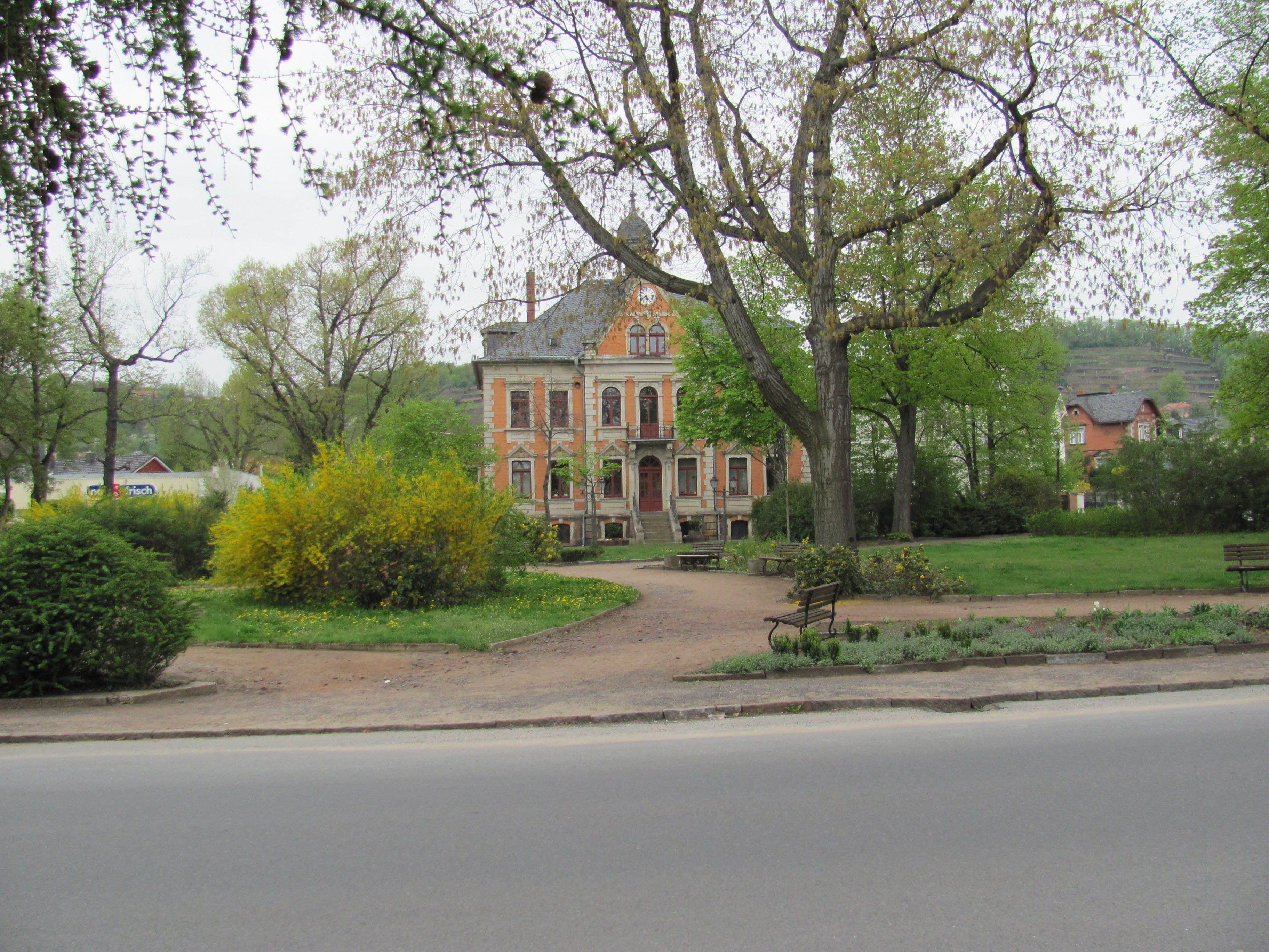 Radebeul, Rosa-Luxemburg-Platz mit ehem. Rathaus Niederlößnitz